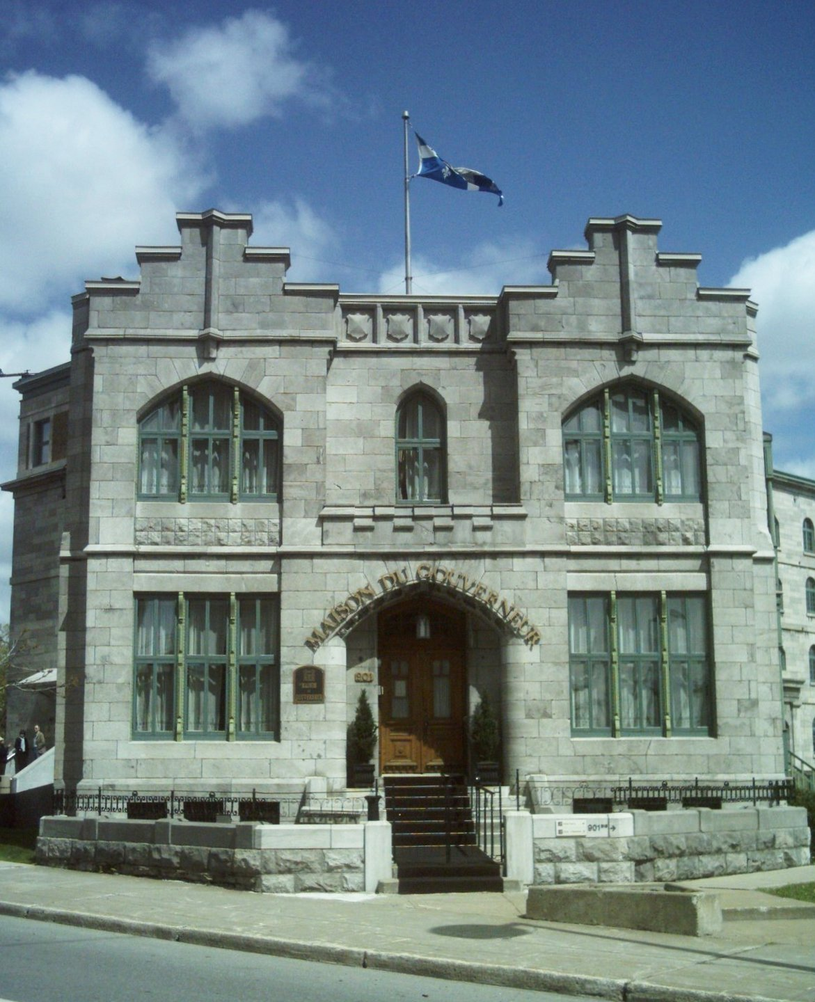 La Maison du Gouverneur devant l'ancienne prison du Pied-du-Courant à Montréal.